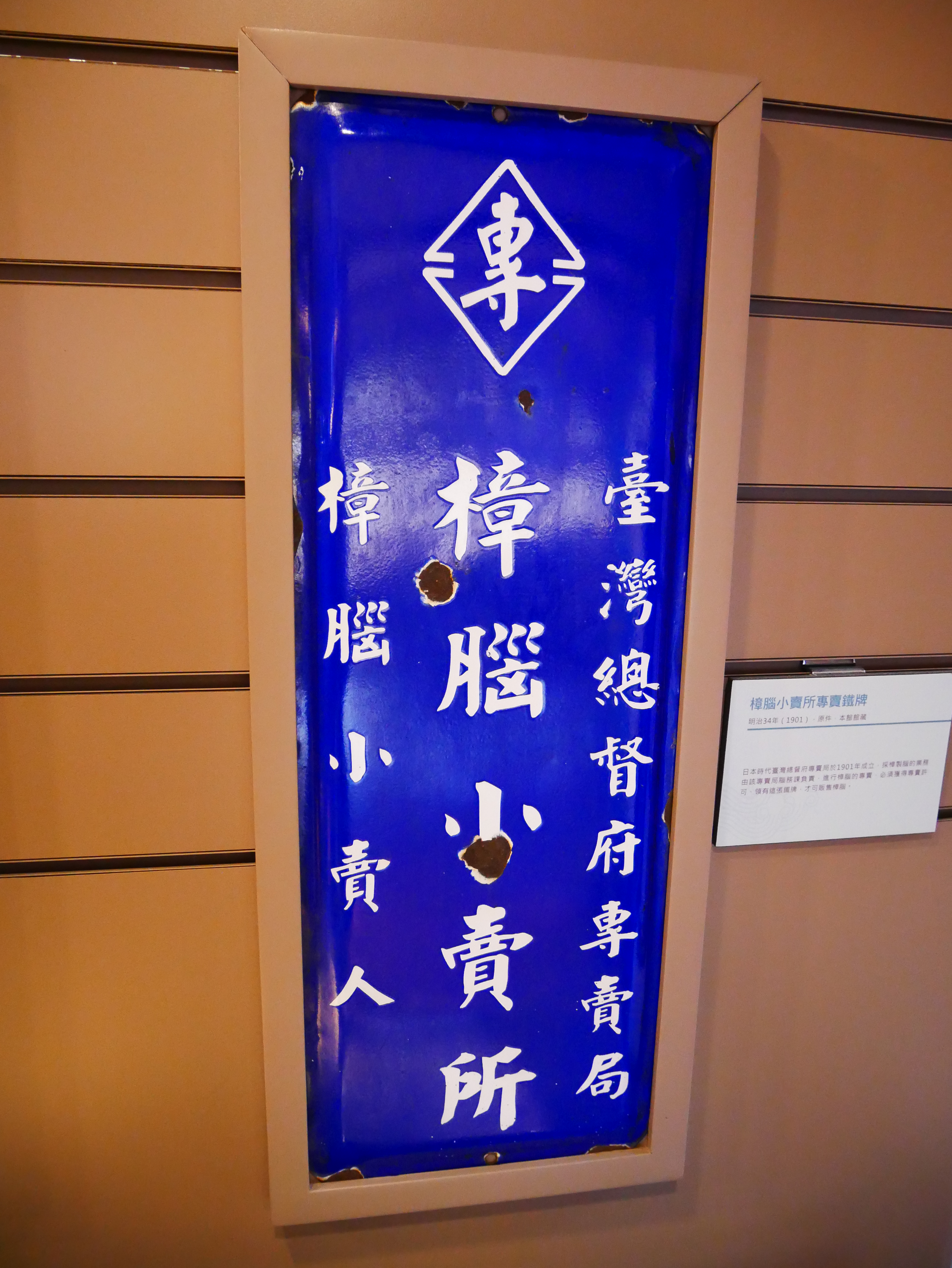 臺灣總督府專賣局所頒樟腦小賣所專賣鐵牌，桃園市大溪區興和里